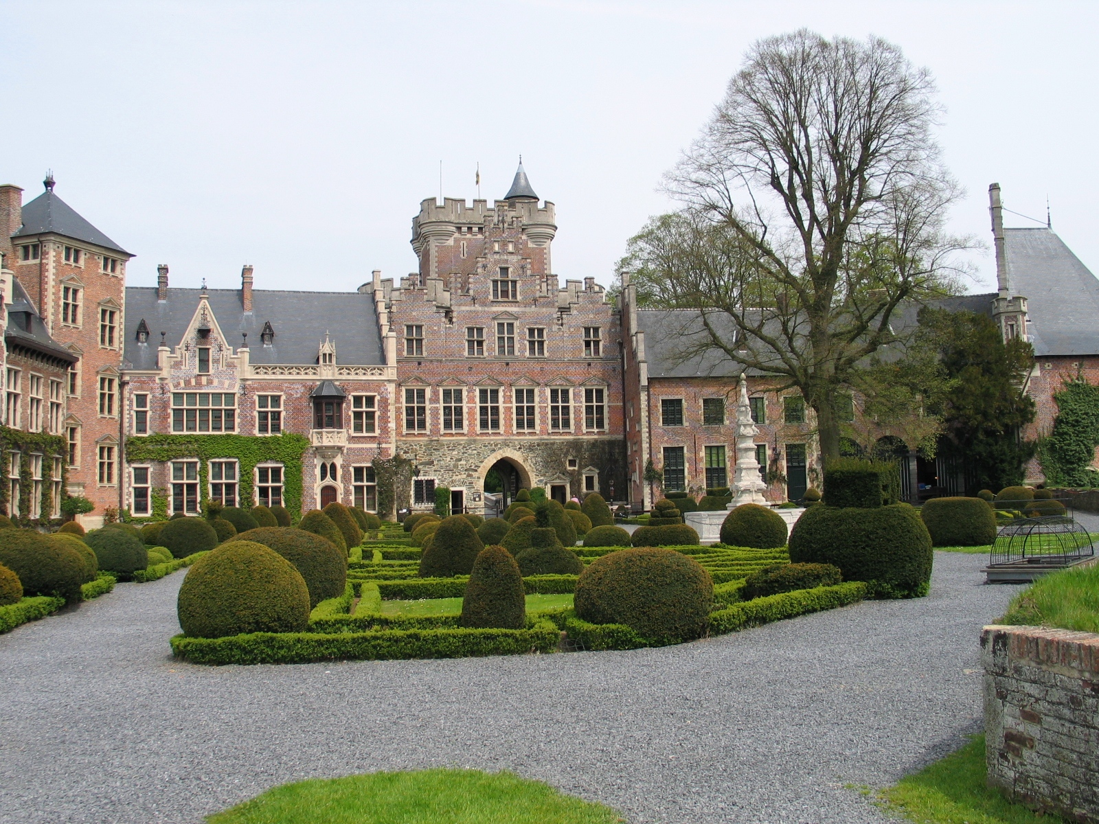 Summary Het binnenhof van het kasteel van Gaasbeek - eigen foto Licensing